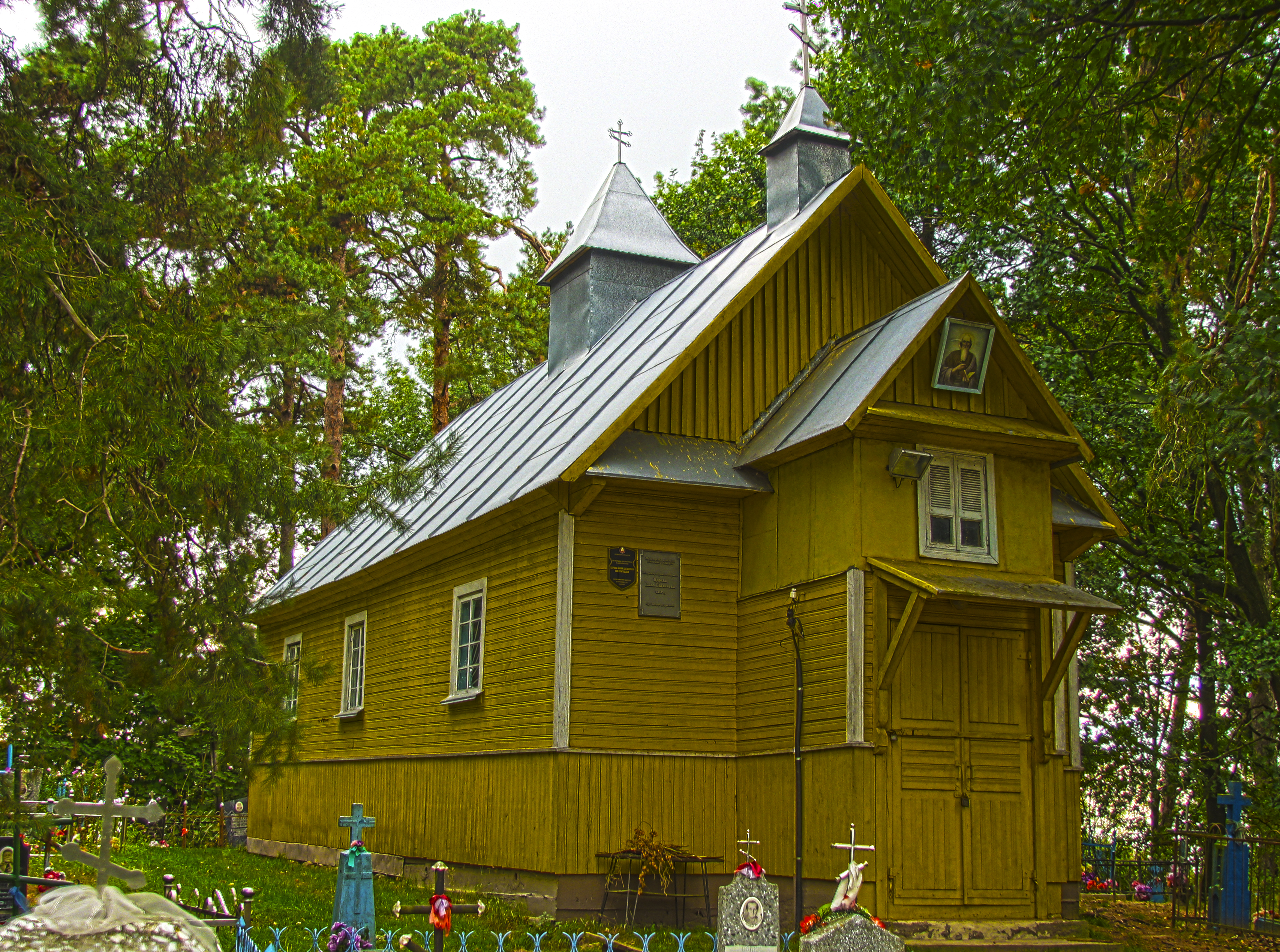 Беларуская (тарашкевіца): Царква Яна Багаслова. в. Стрыгінь This is a photo of Belarusian heritage monument. Reference number: 113Г000153 ( WLM)